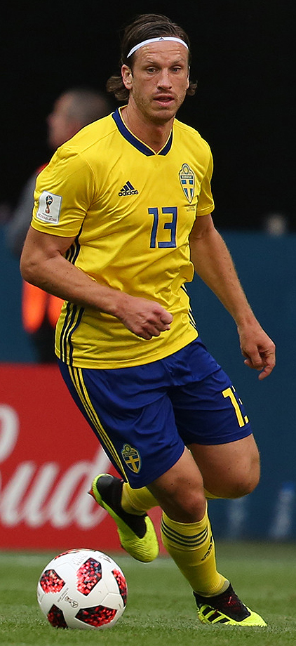 Сборная Швеции зрелищно вышла в четвертьфинал ЧМ-2018